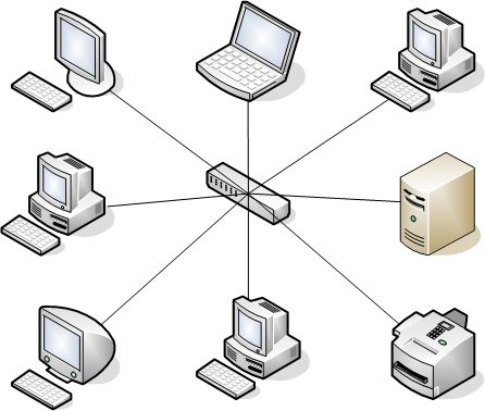 இது விண்மீன் வலையமைப்பை விளக்கும் படம்.